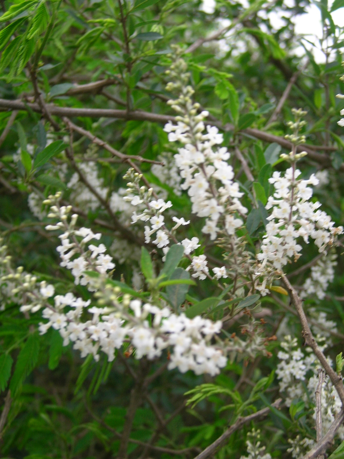 flora uruguay